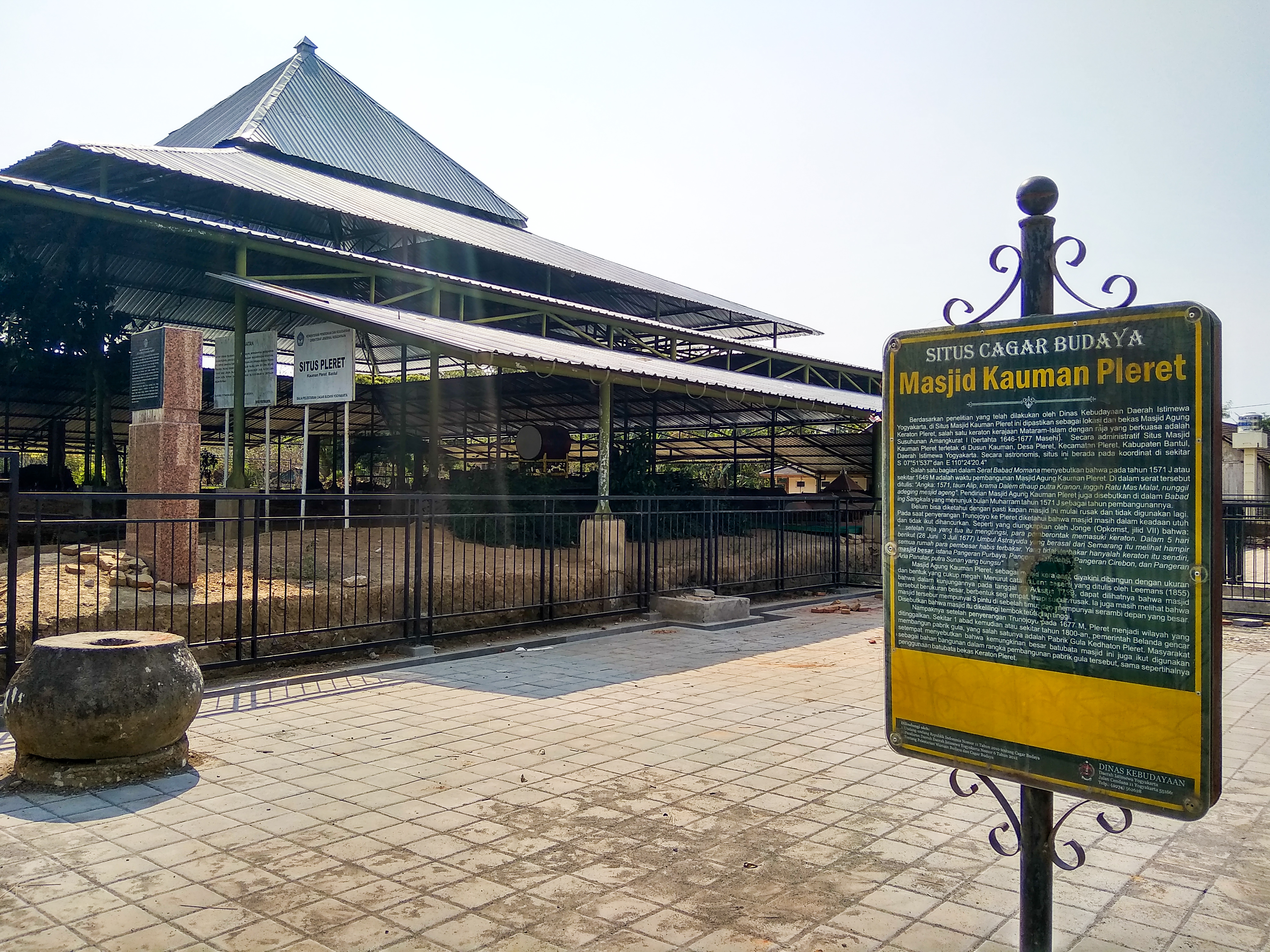 Situs Masjid Kauman Pleret merupakan bekas Masjid Ageng Keraton Pleret pada abad ke-17. Pada penelitian arkeologis yang diadakan tahun 2003-2009, ditemukan struktur bangunan masjid berbahan bata dan batu putih,fragmen keramik, fragmen gerabah, fragmen tulang binatang, dan keris.